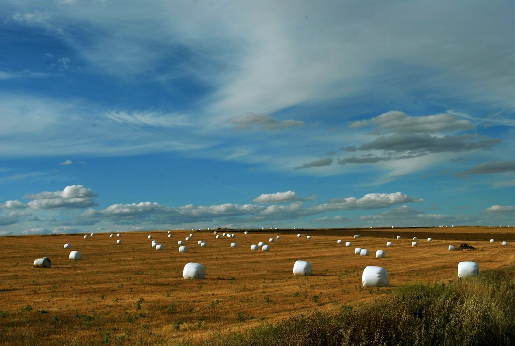 Paisaje en la provincia de Toledo, España.